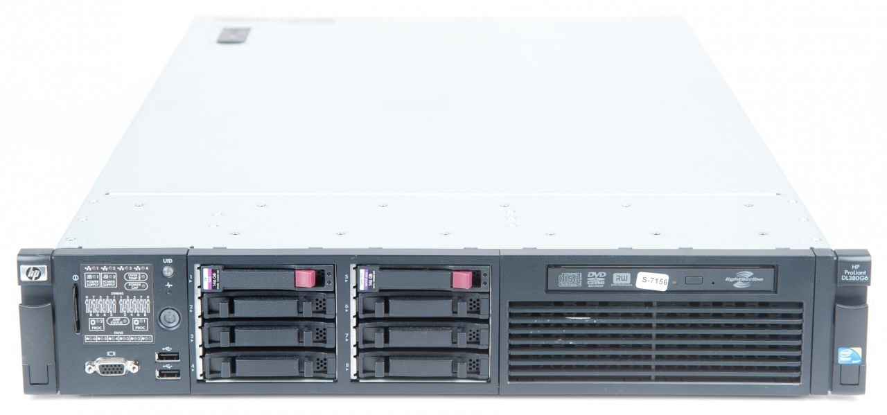 Einer der meist verkauften Server weltweit. Marktanteil 47% (Quelle IDC)